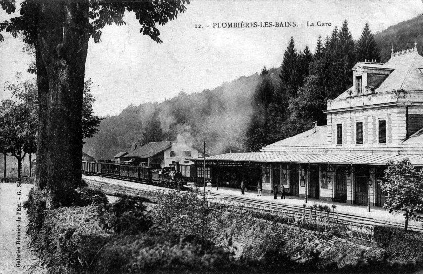 L'intérieur de la gare de Plombières-les-Bains au début des années 1900.